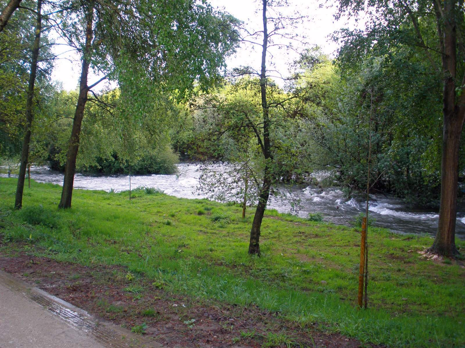 Parque de la Isla y río Jerte (Plasencia, Cáceres)